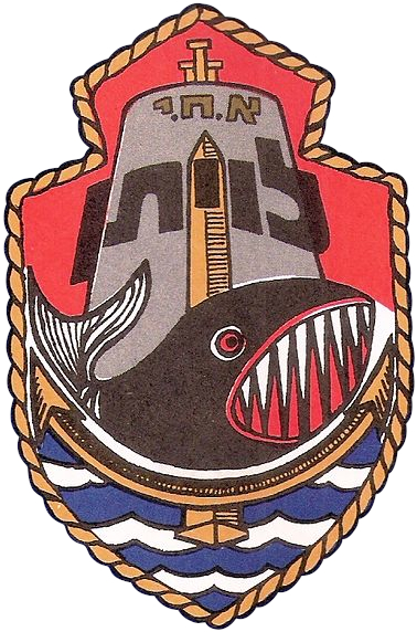 סמלי אוניות חיל הים